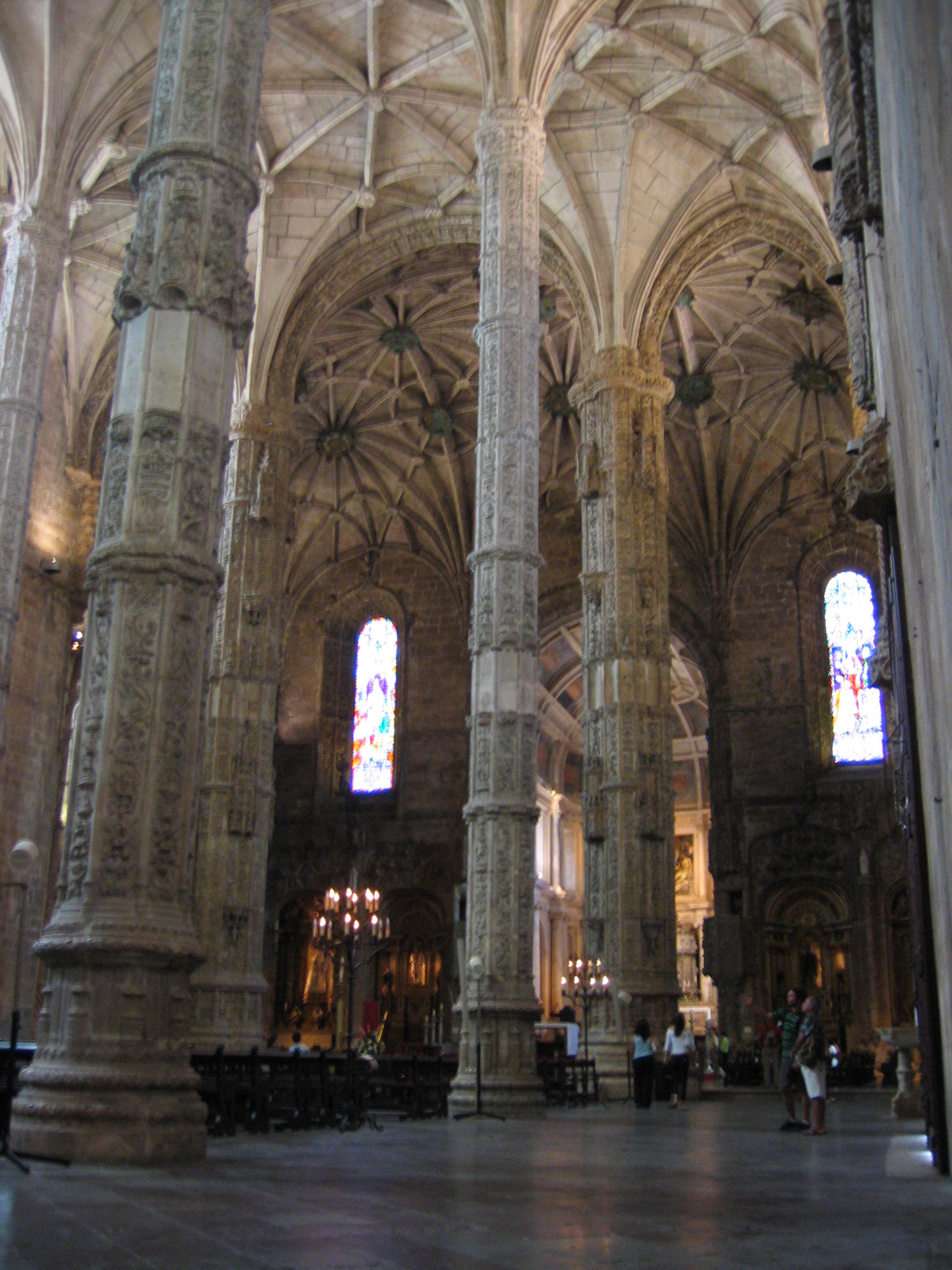 Mosteiro dos Jerónimos (Church) - Portugal Author: Raph Date: 9 August 2005